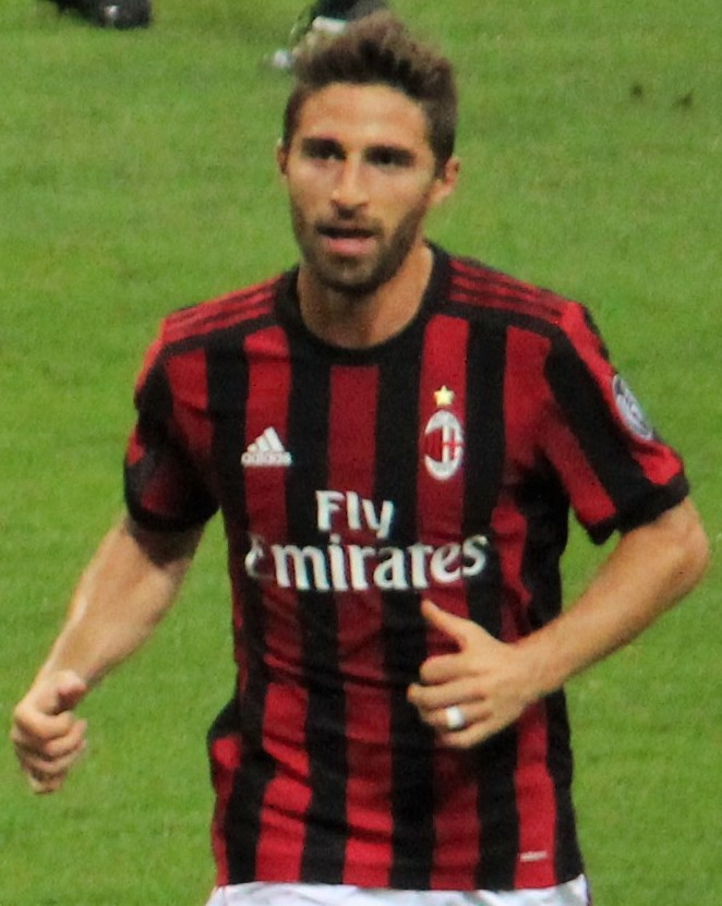 fabio borini con la maglia del milan